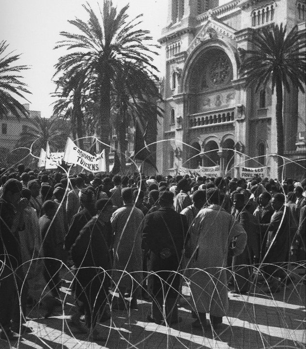 Manifestation devant la Cathédrale Saint-Vincent-de-Paul à Tunis.